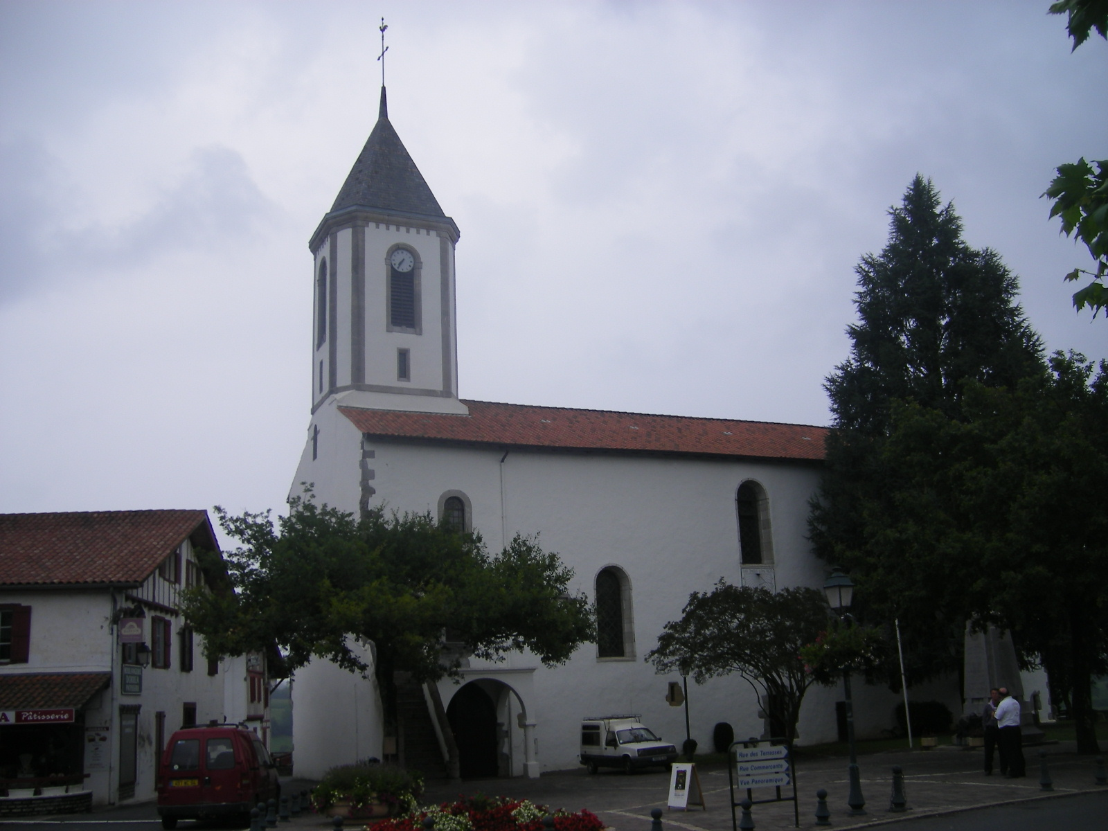 Cambo-les-Bains